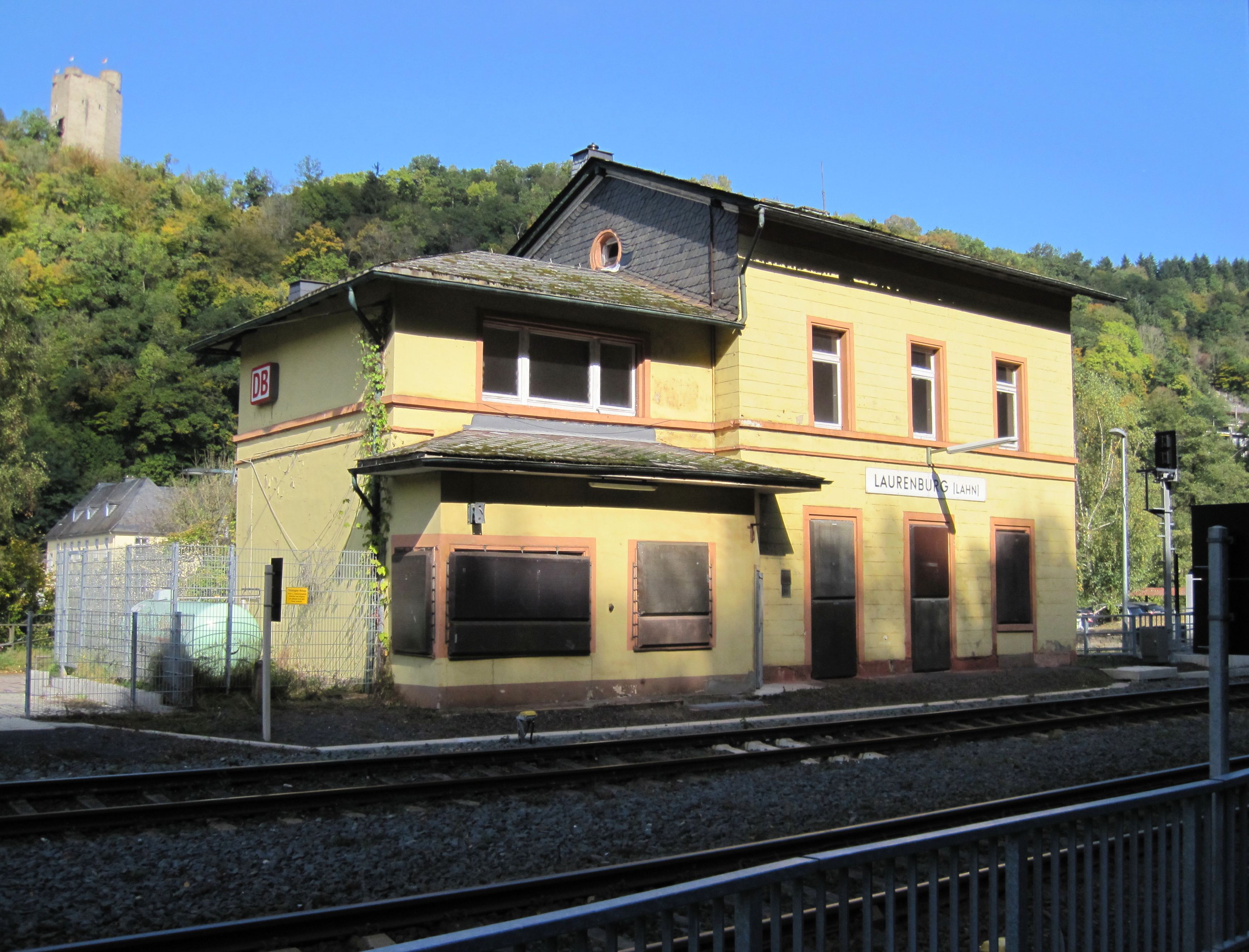 Bahnhof Gutenacker / Laurenburg. Empfangsgebäude der Lahnbahn. Spätklassizistischer Typenbau nach Plänen des Architekten Heinrich Velde, 1862.